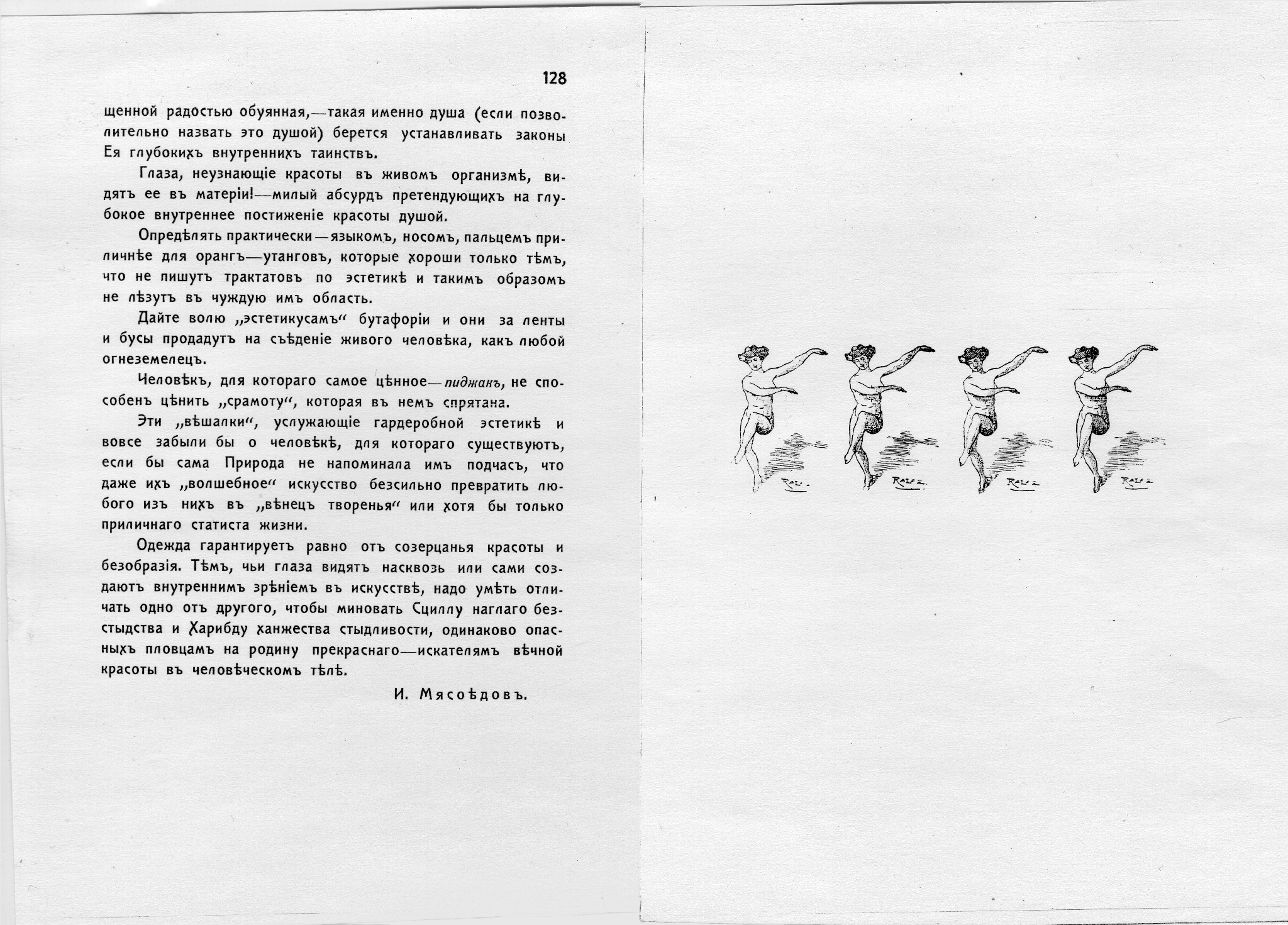 Копии страниц 128, 129 из книги "Нагота на сцене". Издательство Н. И. Бутковской. Санкт-Петербург. 1911